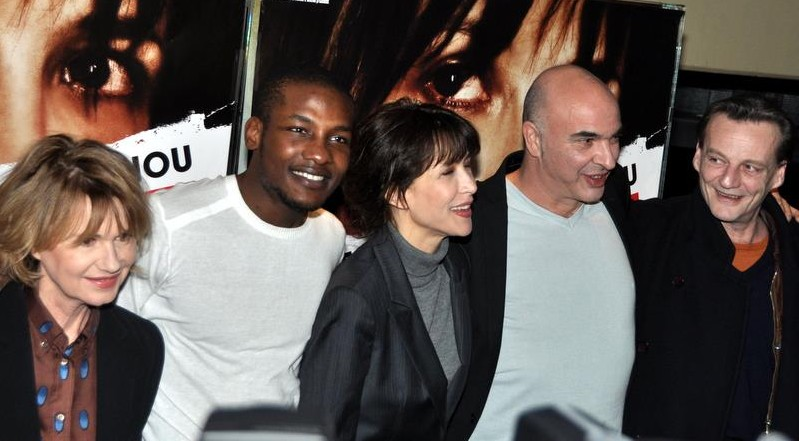 Avant-première du film "Arrêtez-moi" : Miou-Miou, Yann Ebonge, Sophie Marceau, Jean-Paul Lilienfeld et Marc Barbé